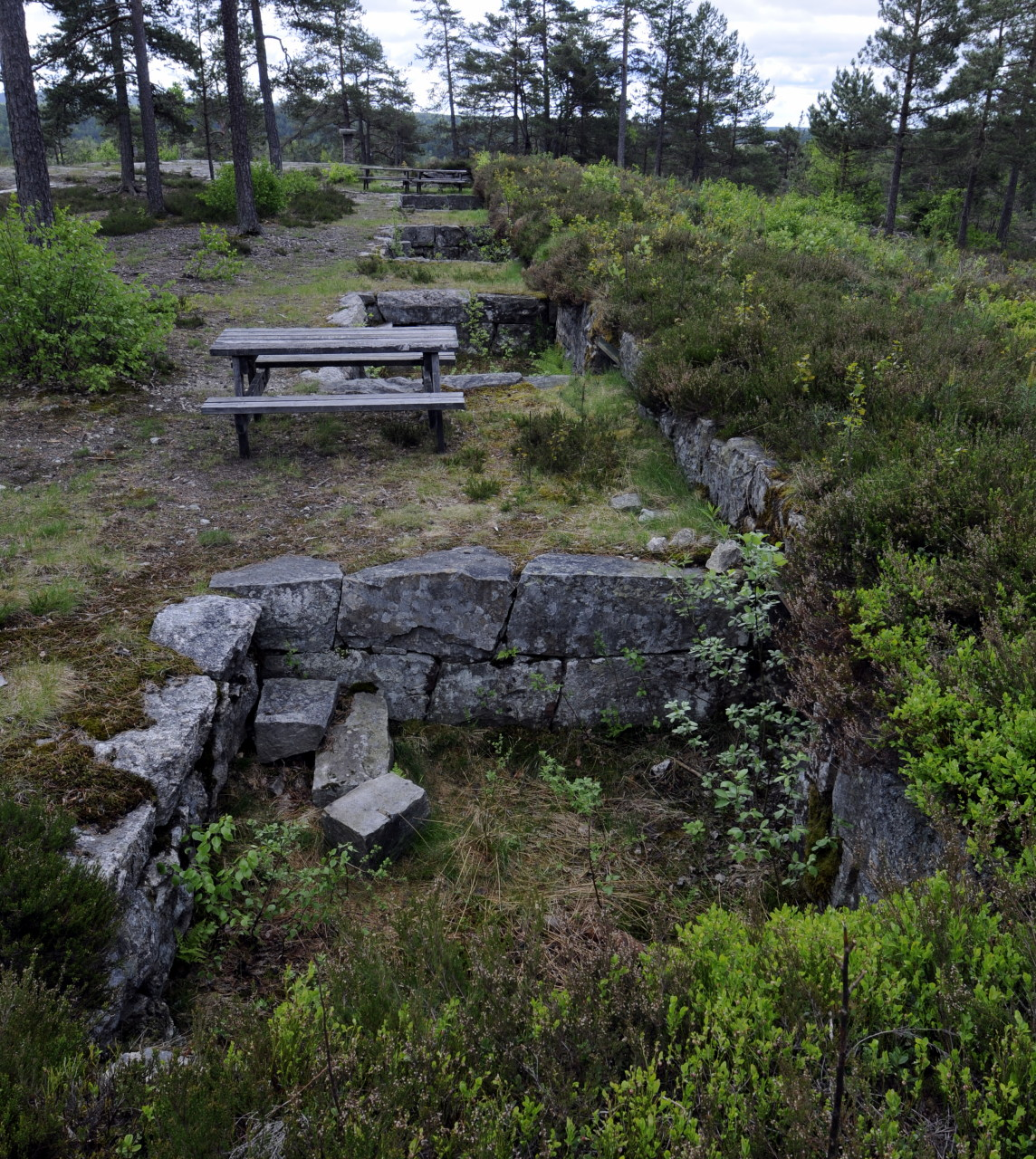 Skansen ved Vetaåsenbatteriet Foto: Tommy Gildseth.